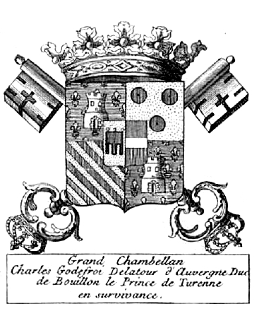 Armes du 6e Duc de Bouillon tirées de l'Encyclopédie ou Dictionnaire raisonné des sciences, des arts et des métiers